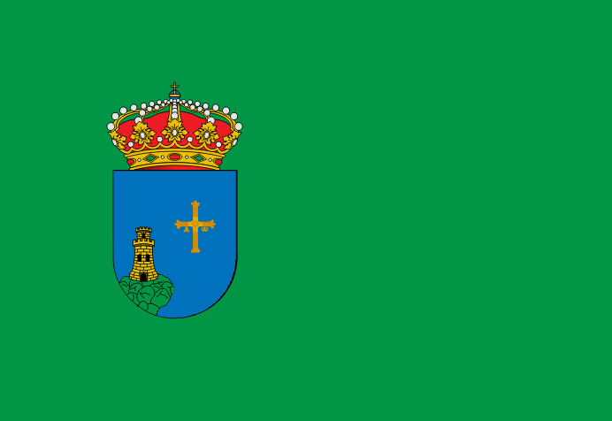 Bandera